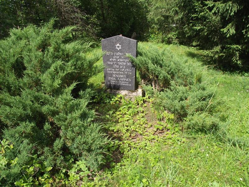 Skapiškio žydų senosios kapinės